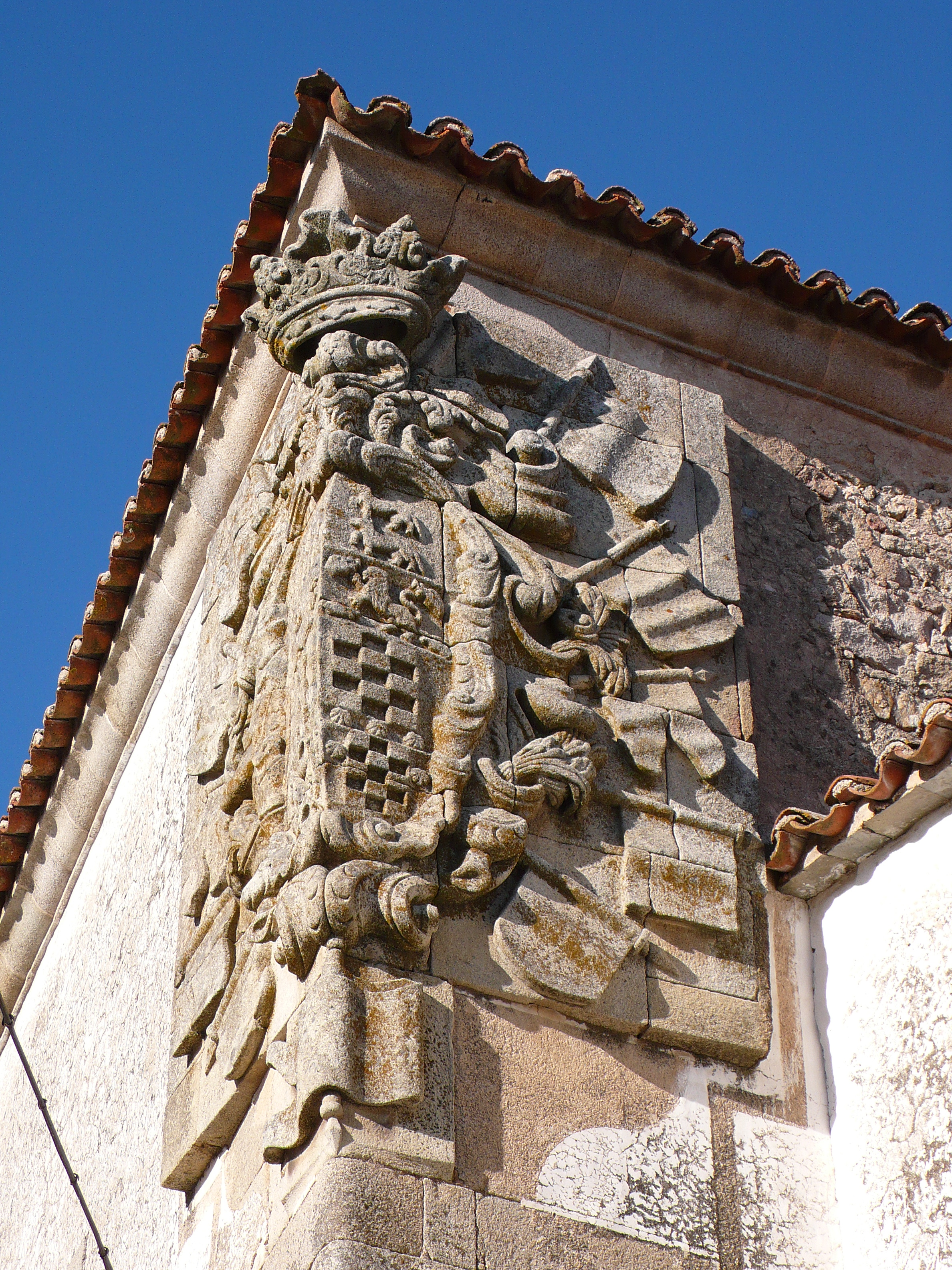 Castillo de Brozas. Escudo de los condes de Canilleros. Brozas, provincia de Cáceres, España.